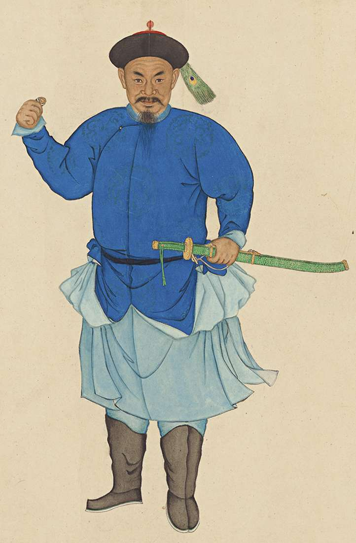 《御筆平定臺灣二十功臣像贊》中的梁朝桂畫像，2014年由紐約iGavel拍賣行拍賣。